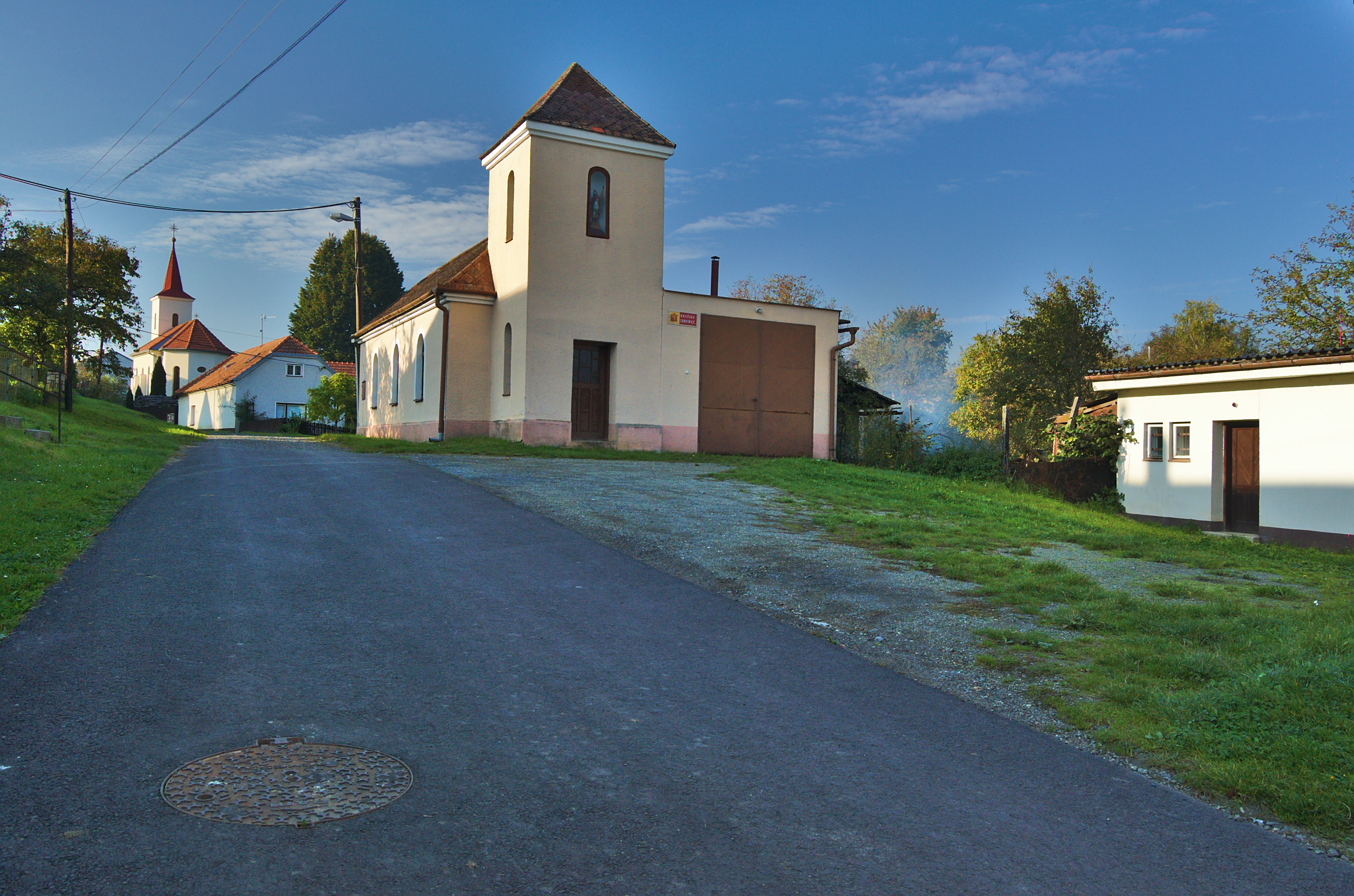 Hasičská zbrojnice, Budětsko, okres Prostějov